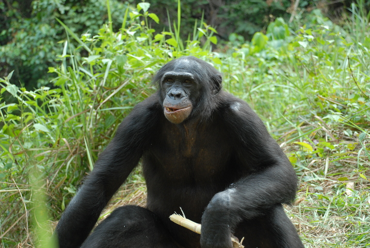 Pan paniscus